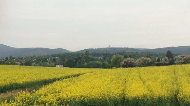 Panorama von Oberstedten mit Taunus im Hintergrund